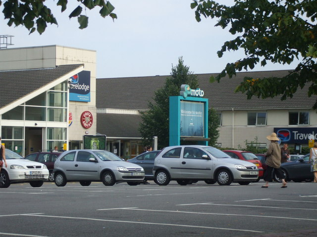 Hello Moto